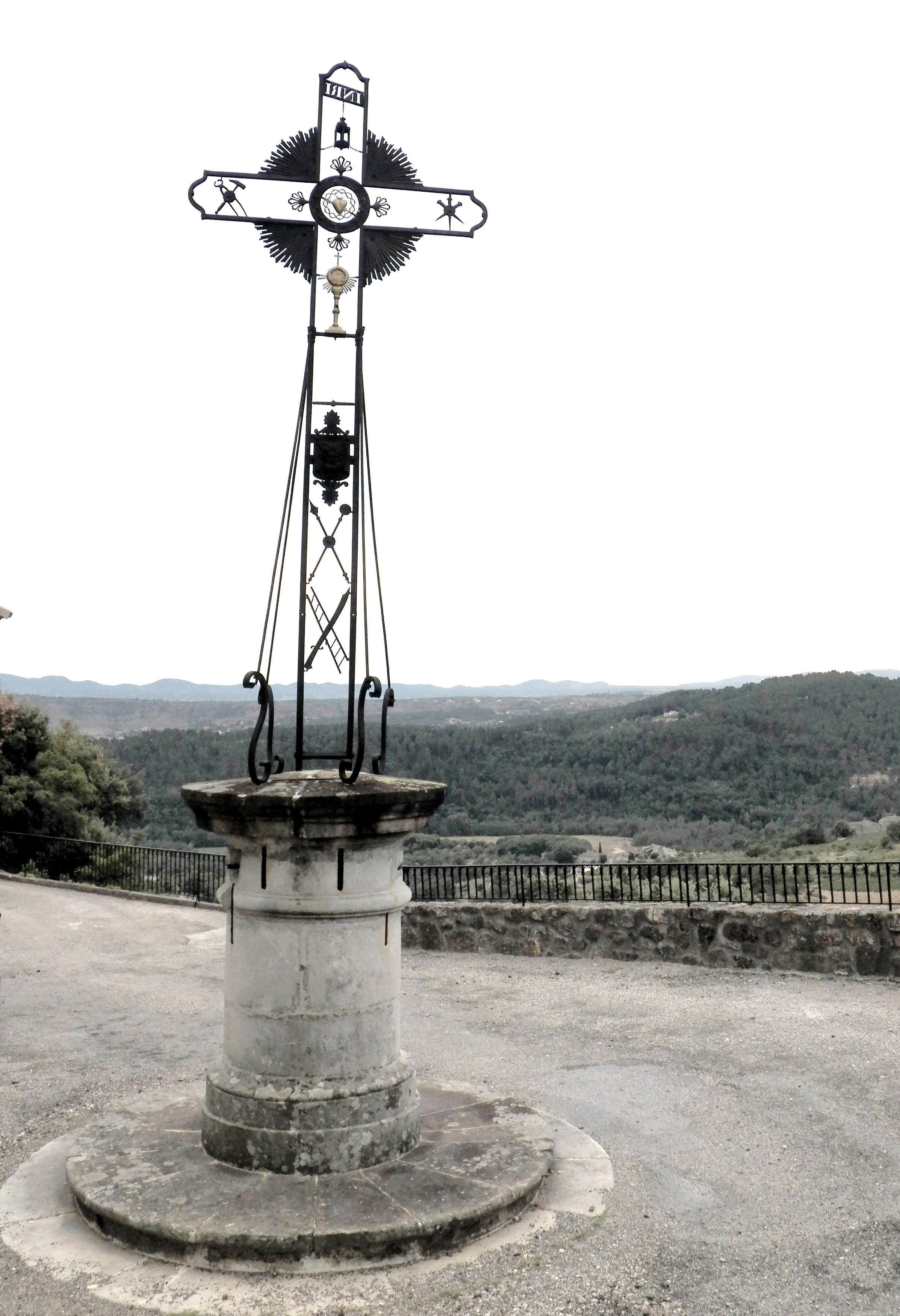 Sur la place de l'église de Vernon (Ardèche), la Croix et le paysage vers la vallée de la Beaume.